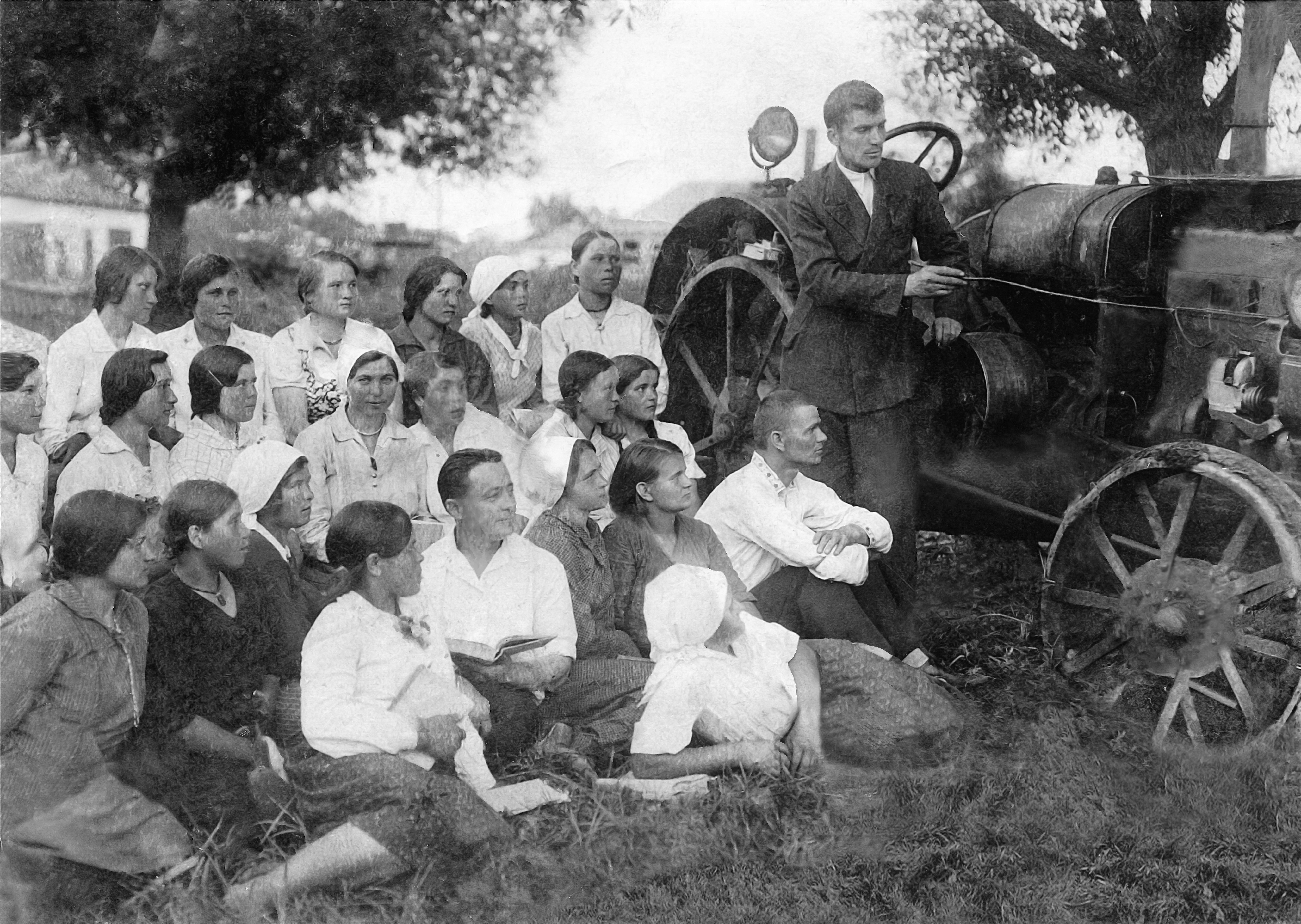 Перший набір учнів до шполянської автошколи (керівник Коваль О.Г. пояснює будову трактора)